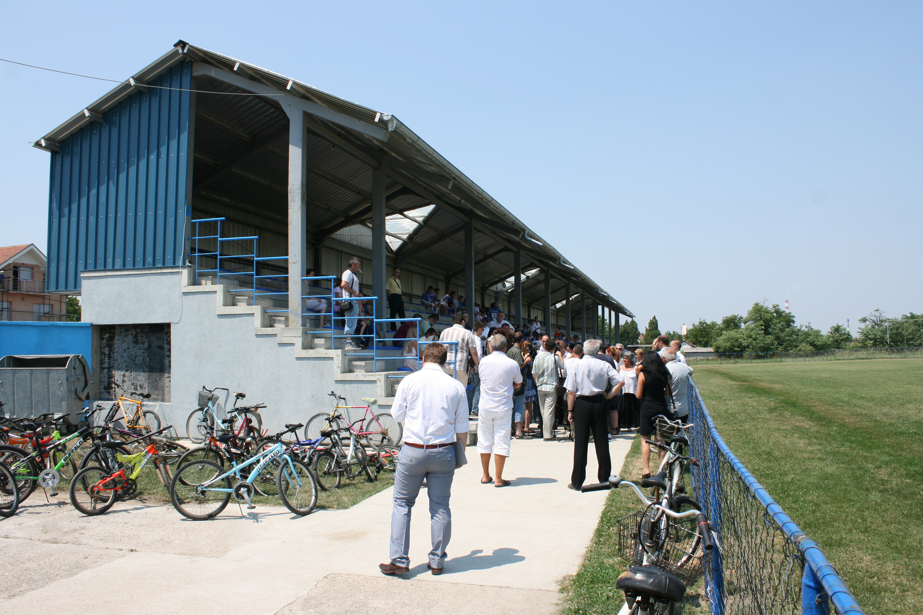 Стадион ФК Борац у Старчеву, Град Панчево, Србија.